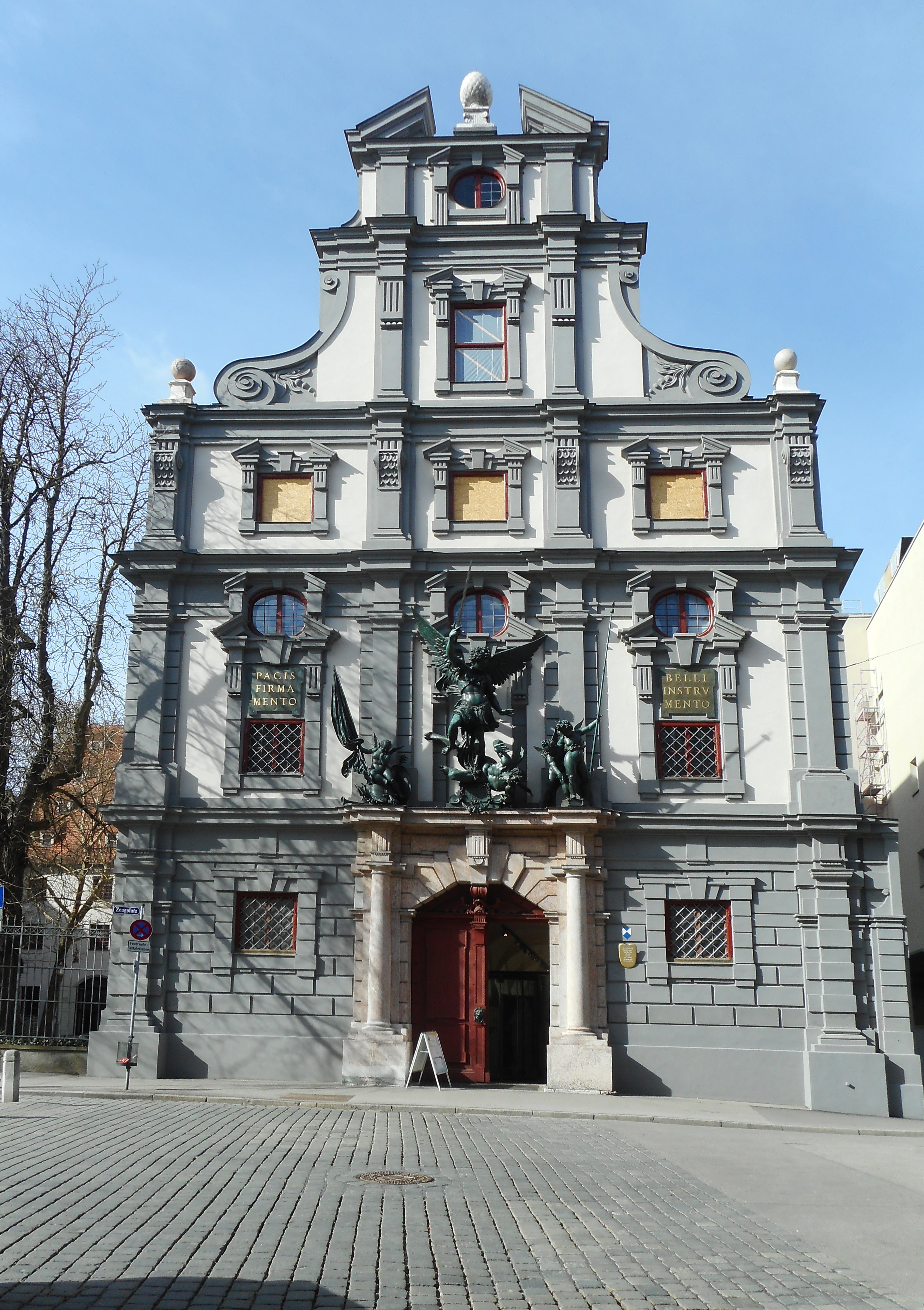 Augsburg - Zeughaus, 2019.